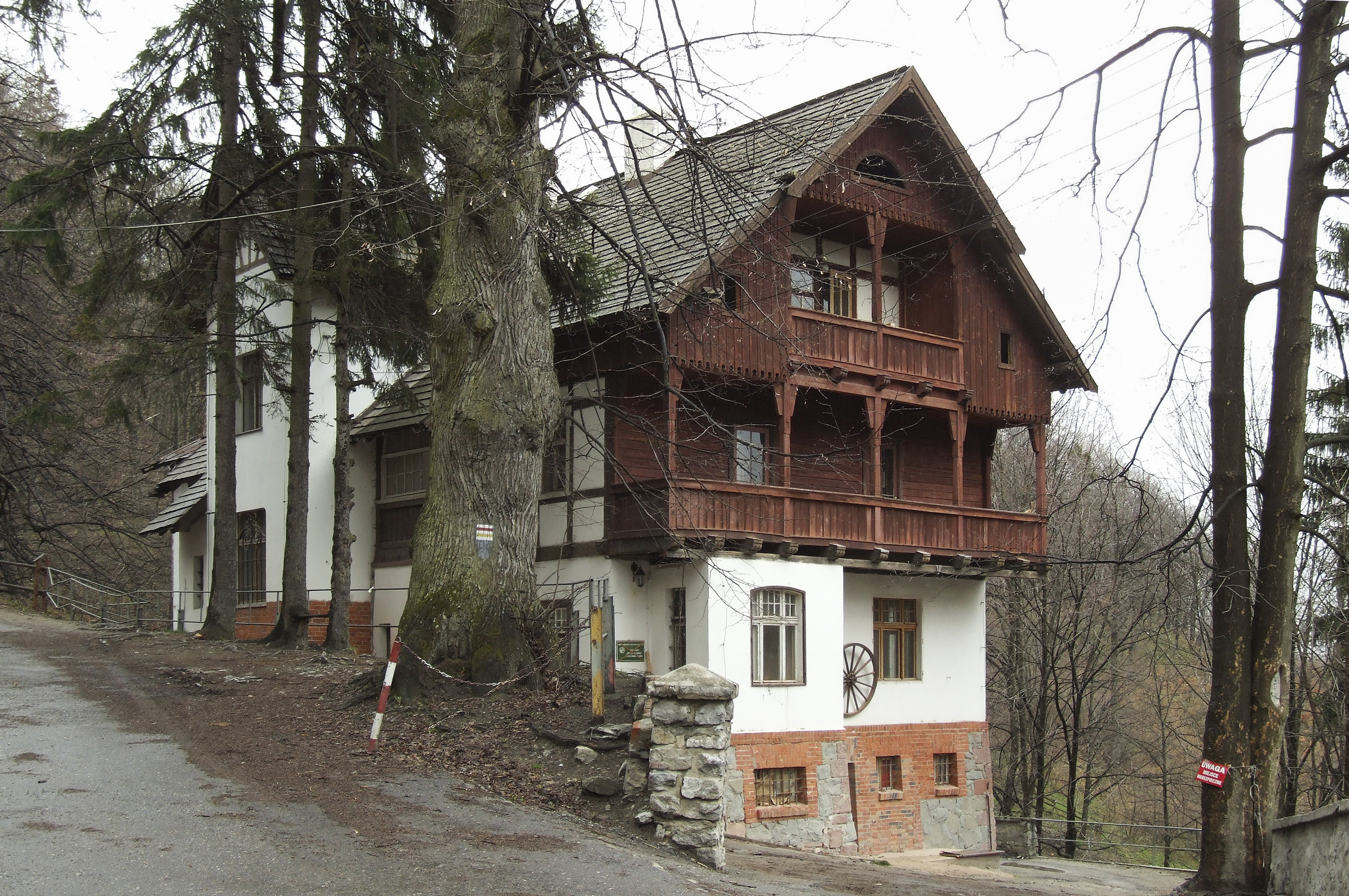 Srebrna Góra, ul. Kręta 2 - pierwotnie willa, nast. schronisko Srebrna Góra, XIX/XX, ob. pensjonat